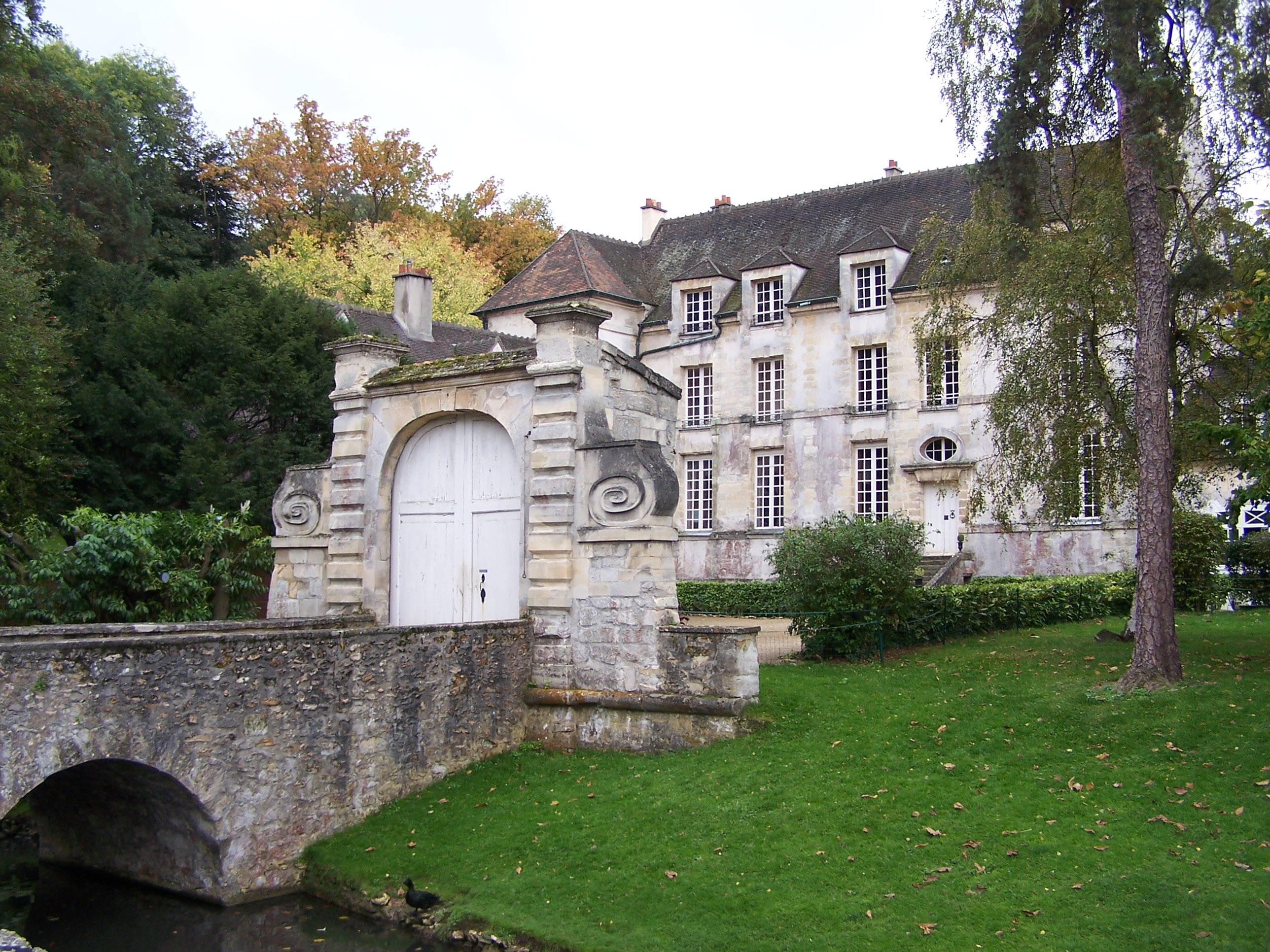 Château du Pont à Louveciennes (Yvelines, France)